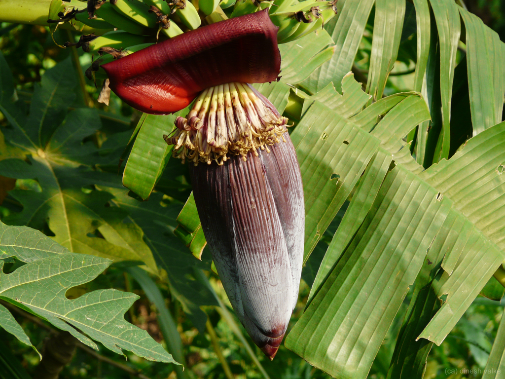 Musaceae (musa family) » Musa paradisiaca MEW-suh -- the Latin word musa, for banana, plantain-fruit par-uh-DIS-ee-uh-ka -- referring to gardens, parks, paradise commonly known as: banana, fig of paradise, plantain • Assamese: কলা kala • Hindi: कदली kadali, केला kela, पापड़ा papra • Kannada: ಬಾಳೇಹಣ್ಣು baalehannu, ಬಳೆ ಕಾಯಿ bale kaayi, ಕದಳಿ kadali • Kashmiri: केल kela • Konkani: क्यांळे kyaanle • Malayalam: മഊചം maaucam, വാഴ vaazha • Manipuri: লফূ থরো laphoo tharo • Marathi: कदल kadala, केळ kela • Nepalese: कदली kadali • Sanskrit: भानुफला bhanuphala, कदली kadali, मोच mocha • Tamil: வாழை vaazha • Telugu: అరటి arati, కదళ kadala • Urdu: کيلا kelaa, موز mauz Distribution: cultivated pantropically References: Flowers of India • EcoPort • M.M.P.N.D.